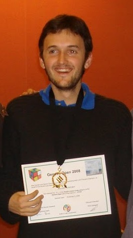 Edouard Chambon photographié avec un prix lors d'une compétition